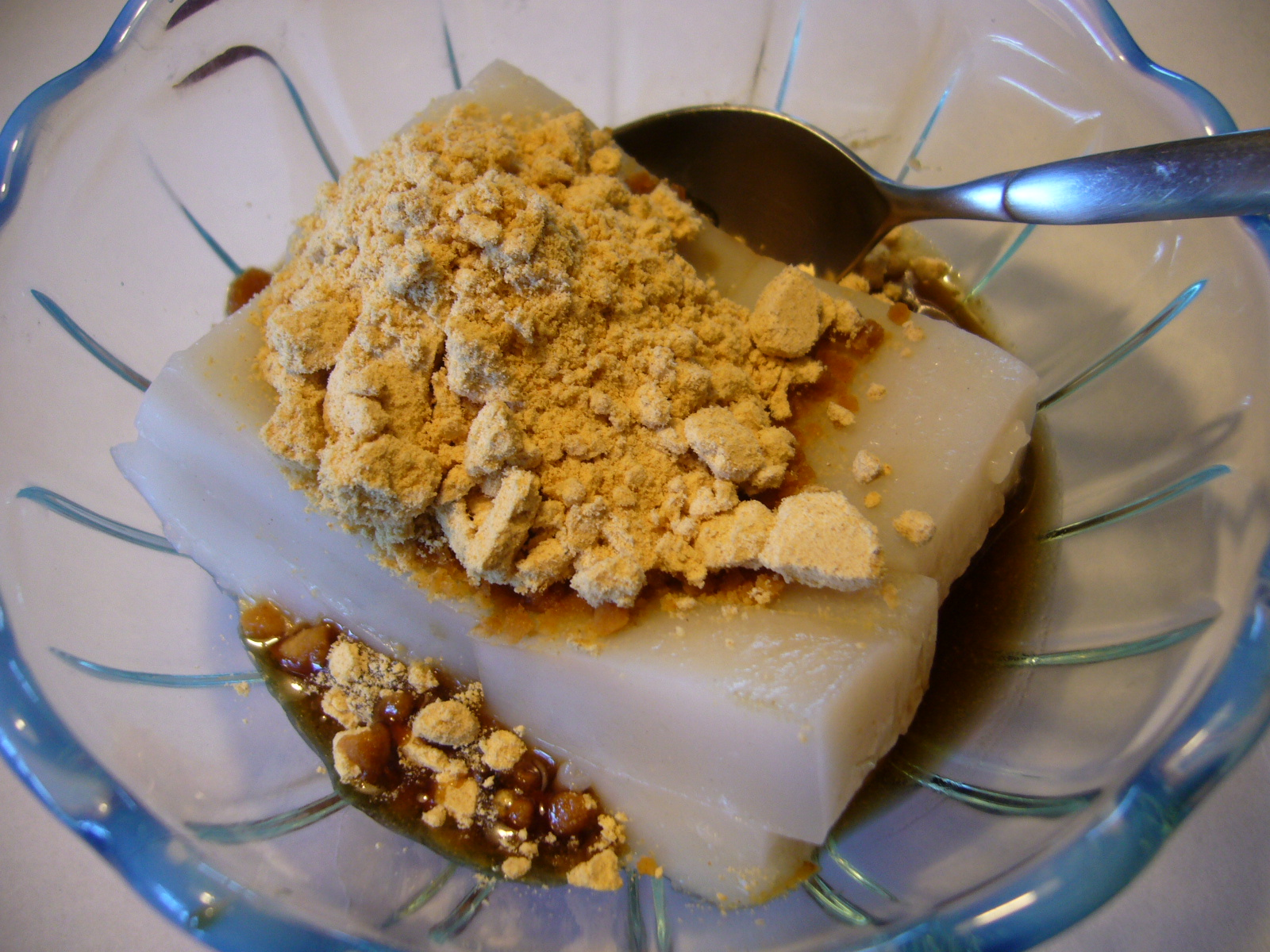 kudzu starch cake,katori-city,japan